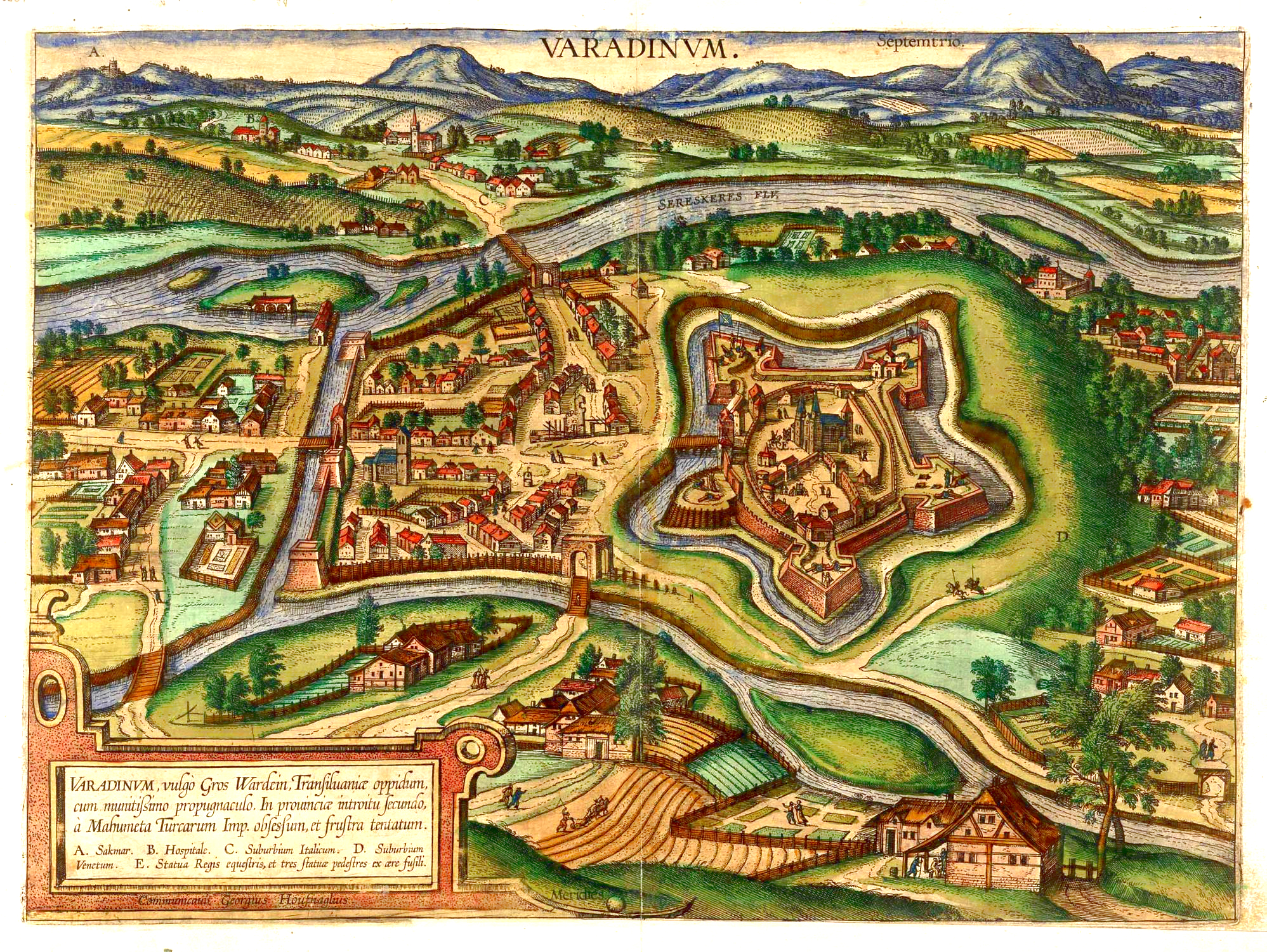 Gesamtansicht aus der halben Vogelschau ('Varadinum, volgo Gros Wardein, Transsilvaniae oppidum . - Communicavit Georgius Houfnaglius.').